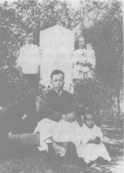 1923年申圭植家人在上海申圭植墓前祭奠留影